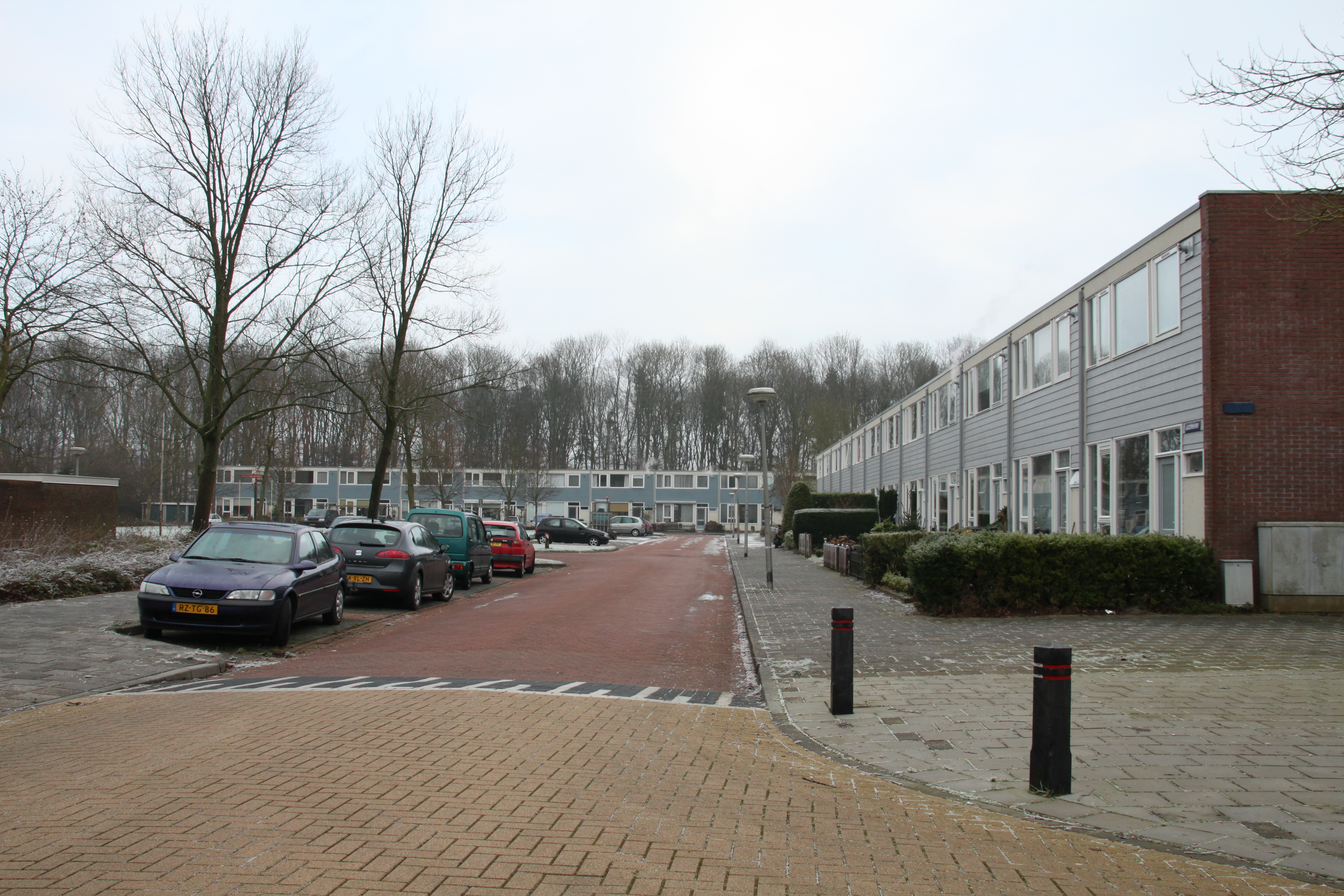 Een straat in Nagele.